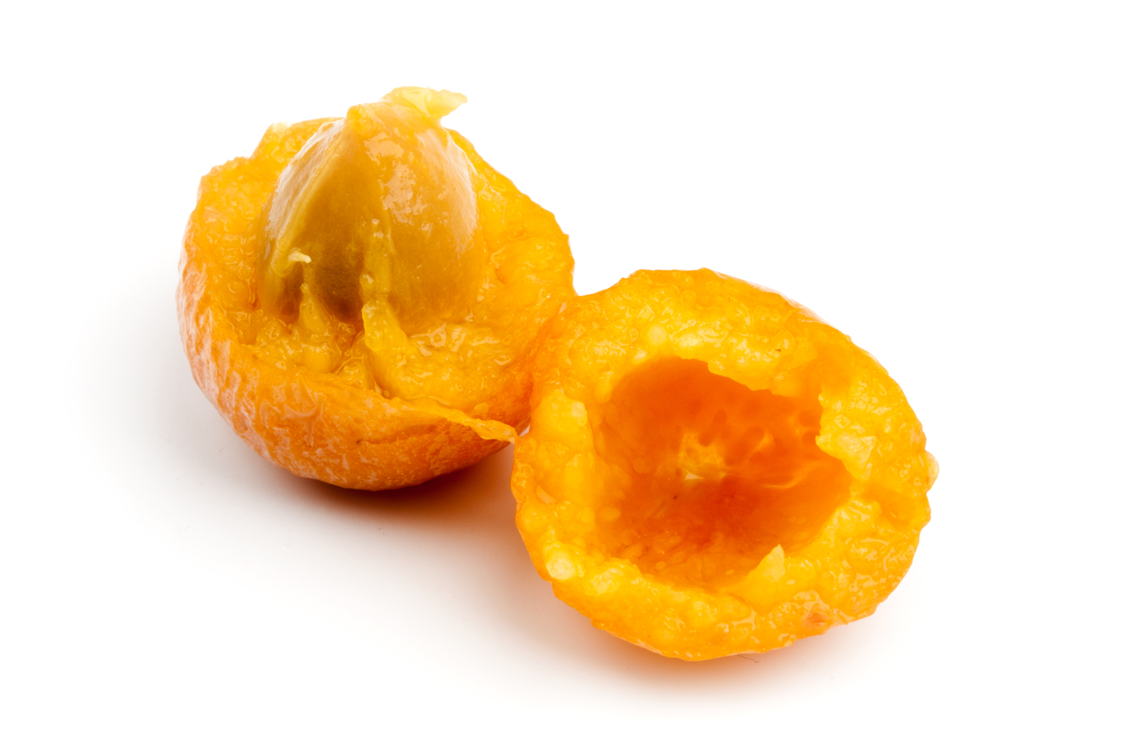 Een opengesneden ginnanvrucht, de ginnannoot en het vlezige vruchtvlees van de oranje vrucht zijn goed te zien.